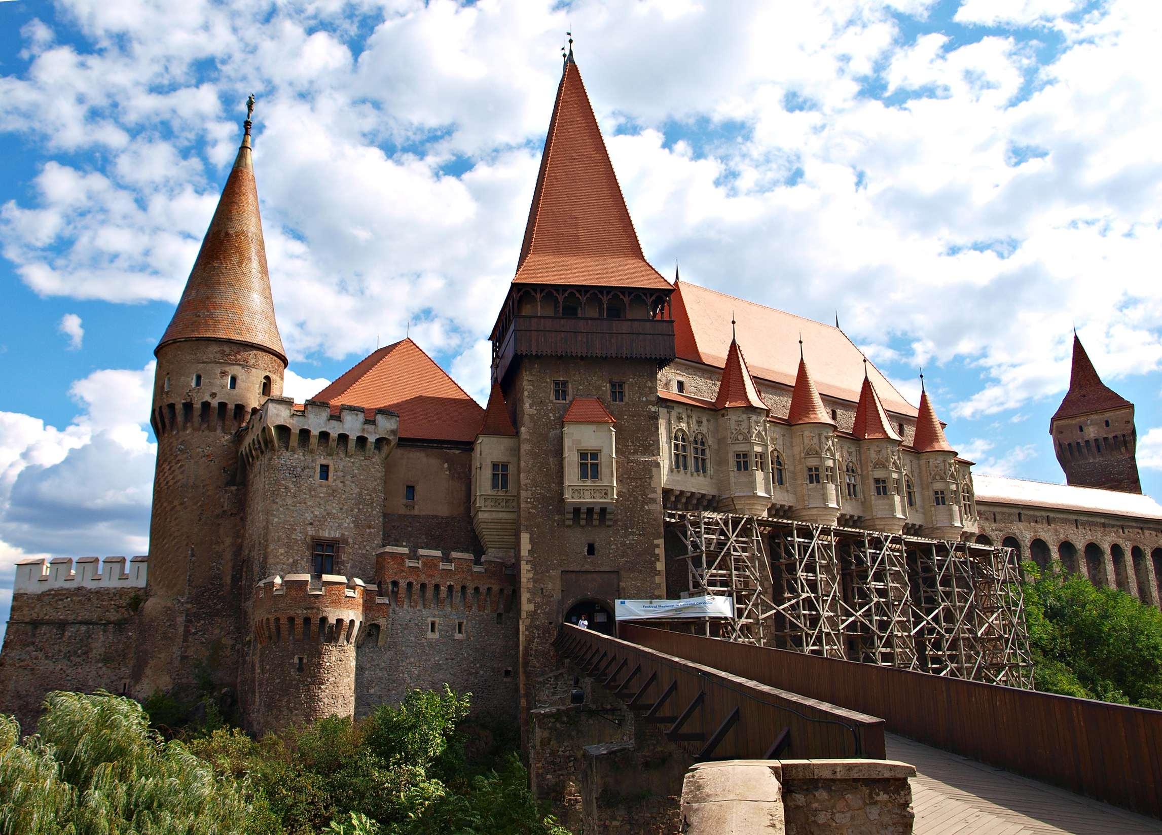 Hunyad Castle, Hunedoara, Transylvania, Romania